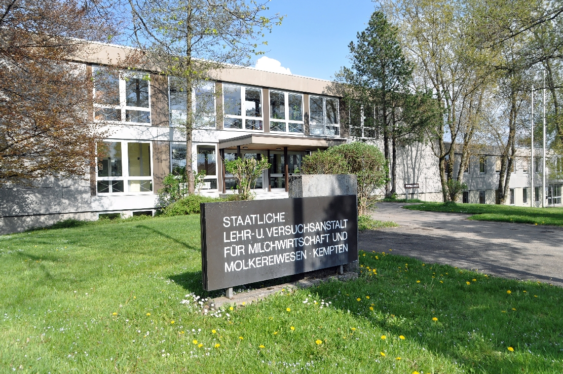 Bilder aus Kempten